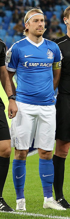 «Динамо» СПб - «Зенит»